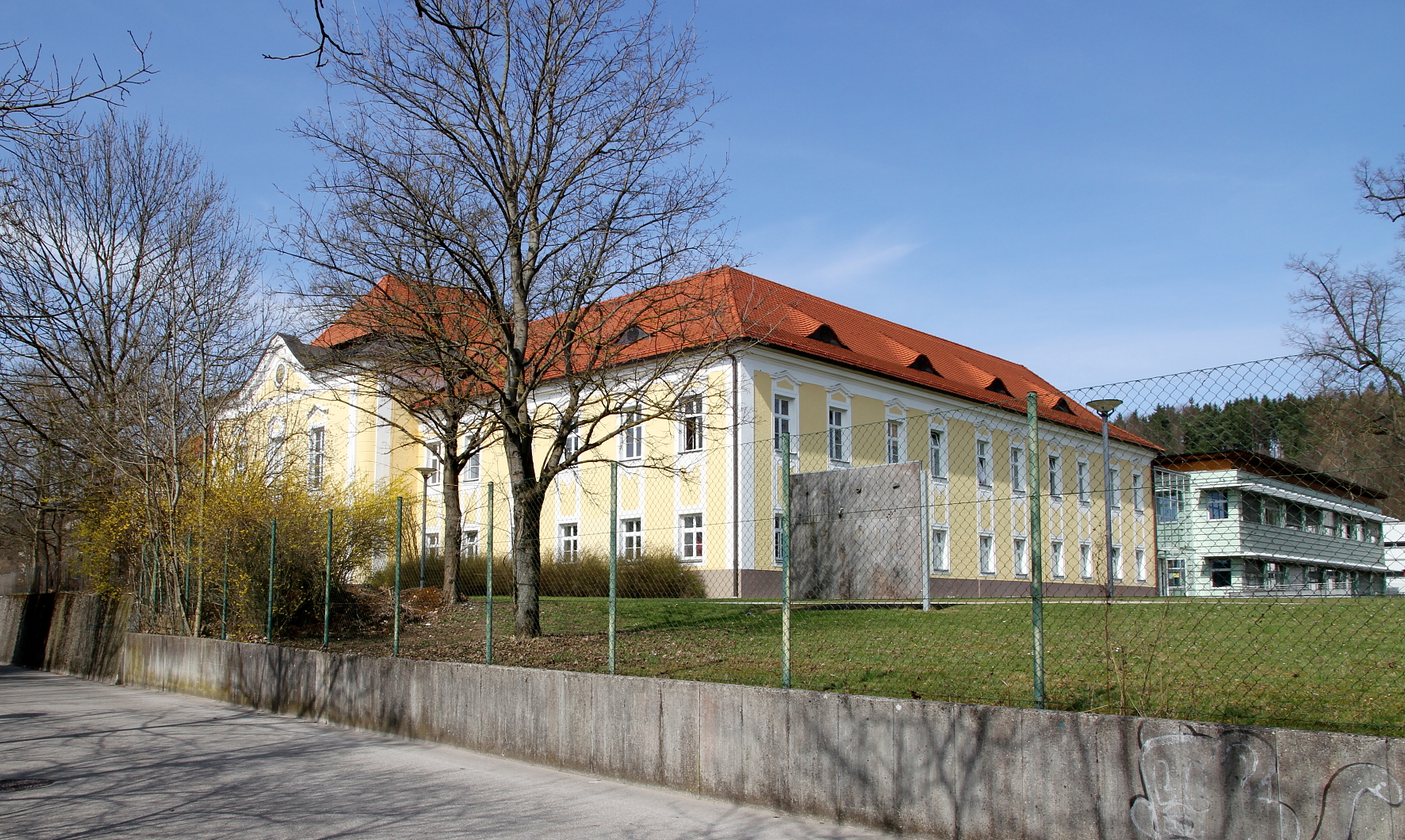 Ehemaliges Schloss Wagrain in der oberösterreichischen Stadt Vöcklabruck.